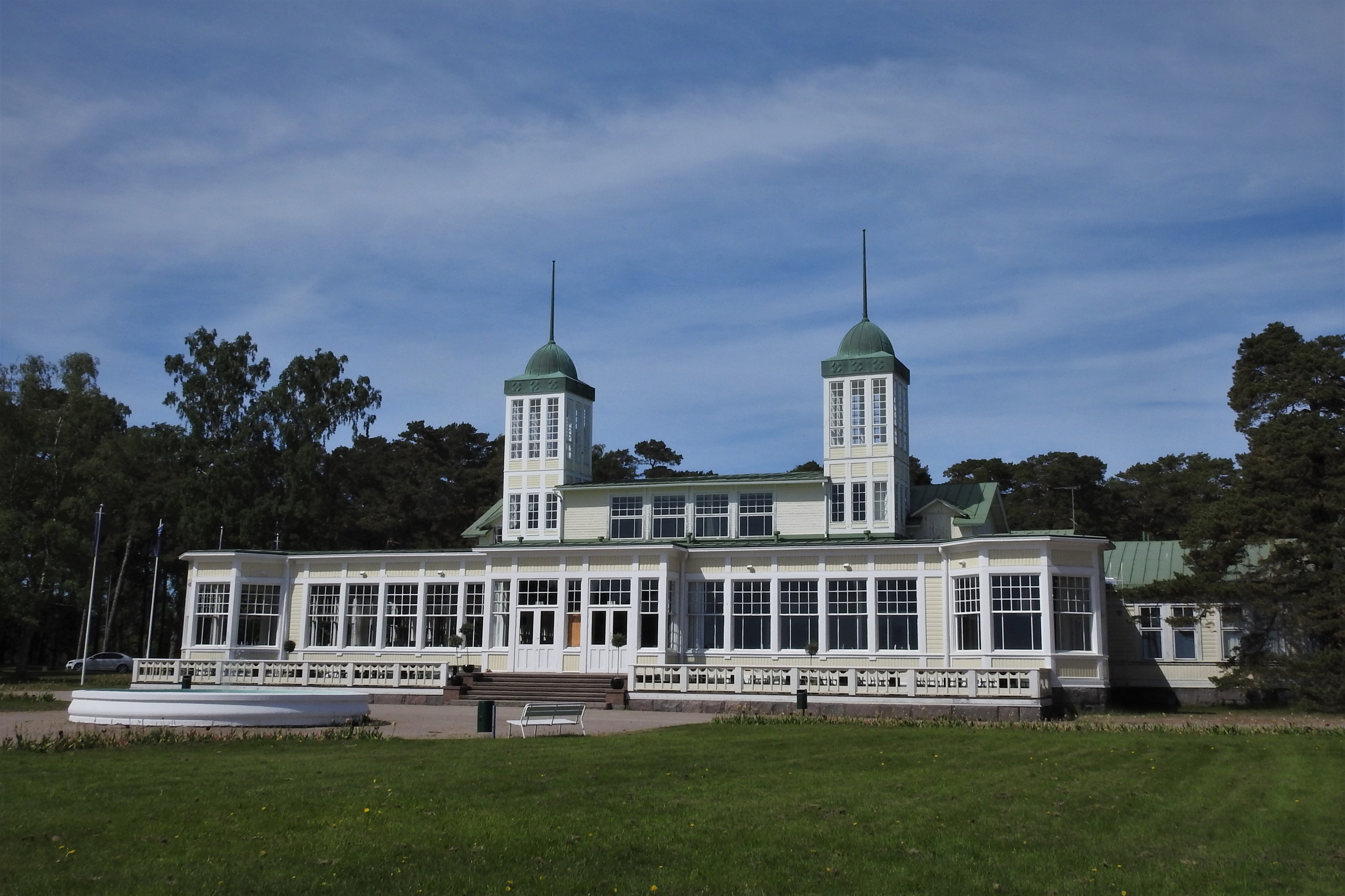 Hangon Casino